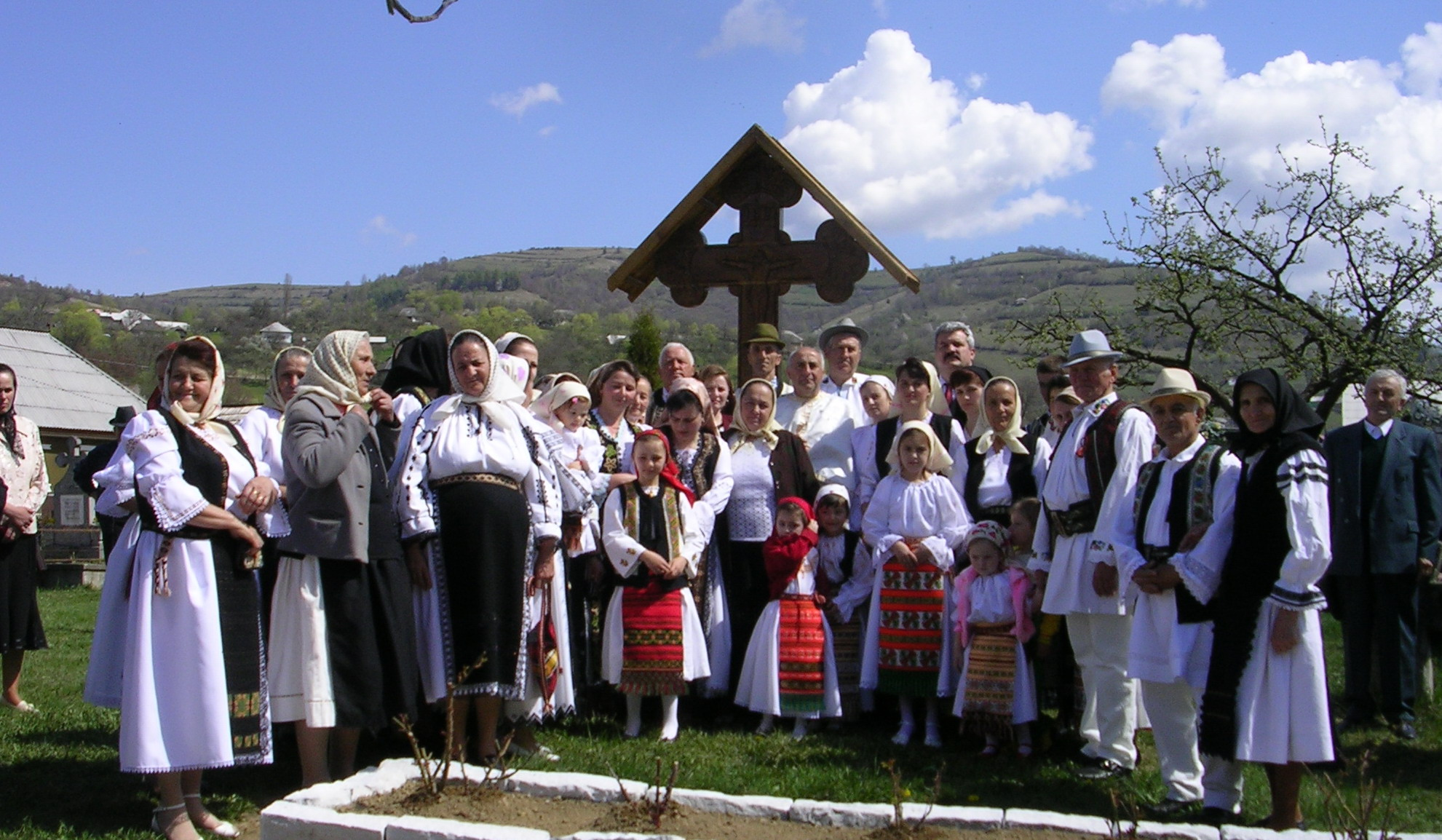 Sfințirea troiței din Leșu, 2008